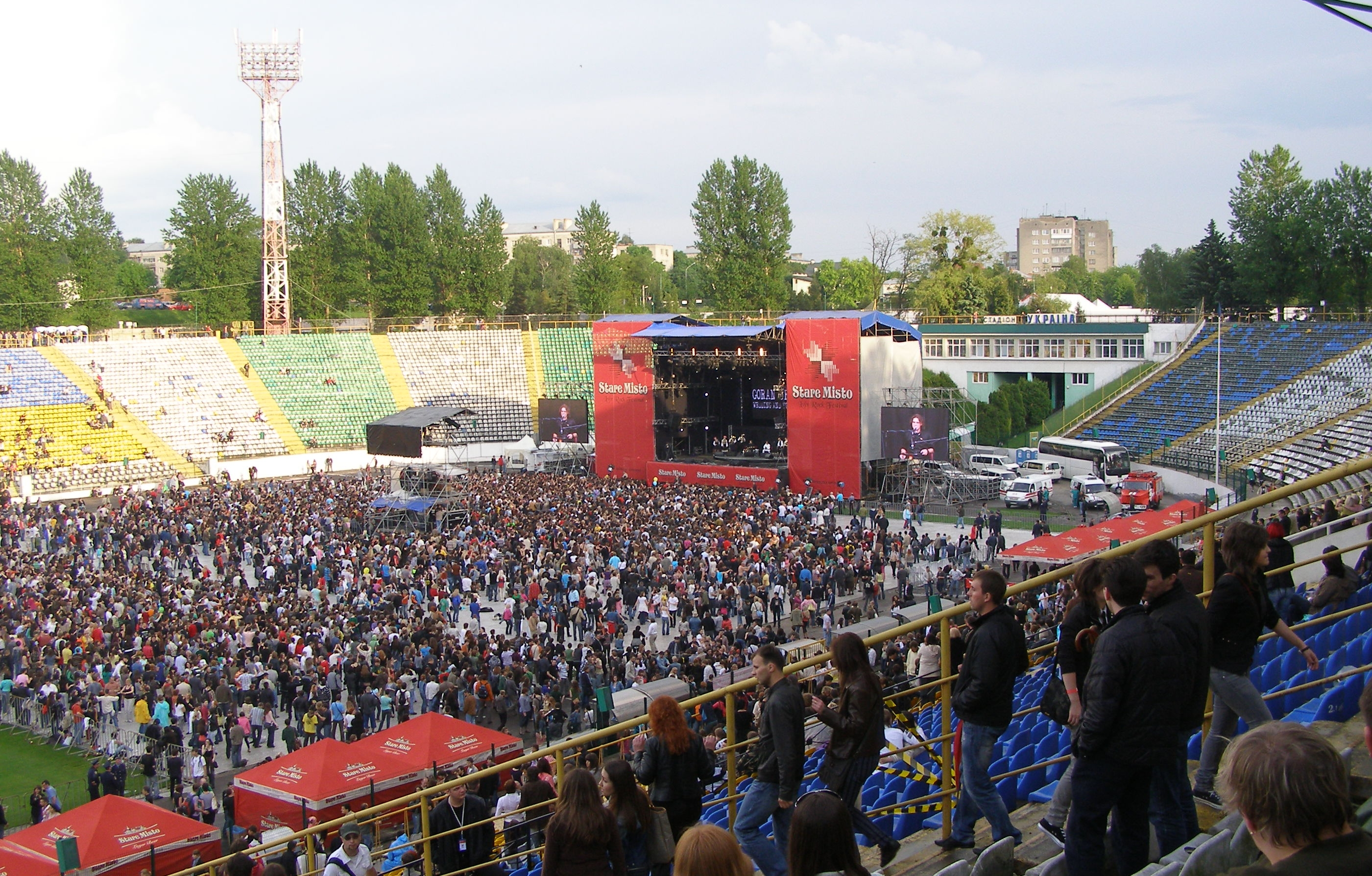 »Stare Misto« Festival in Lwiw